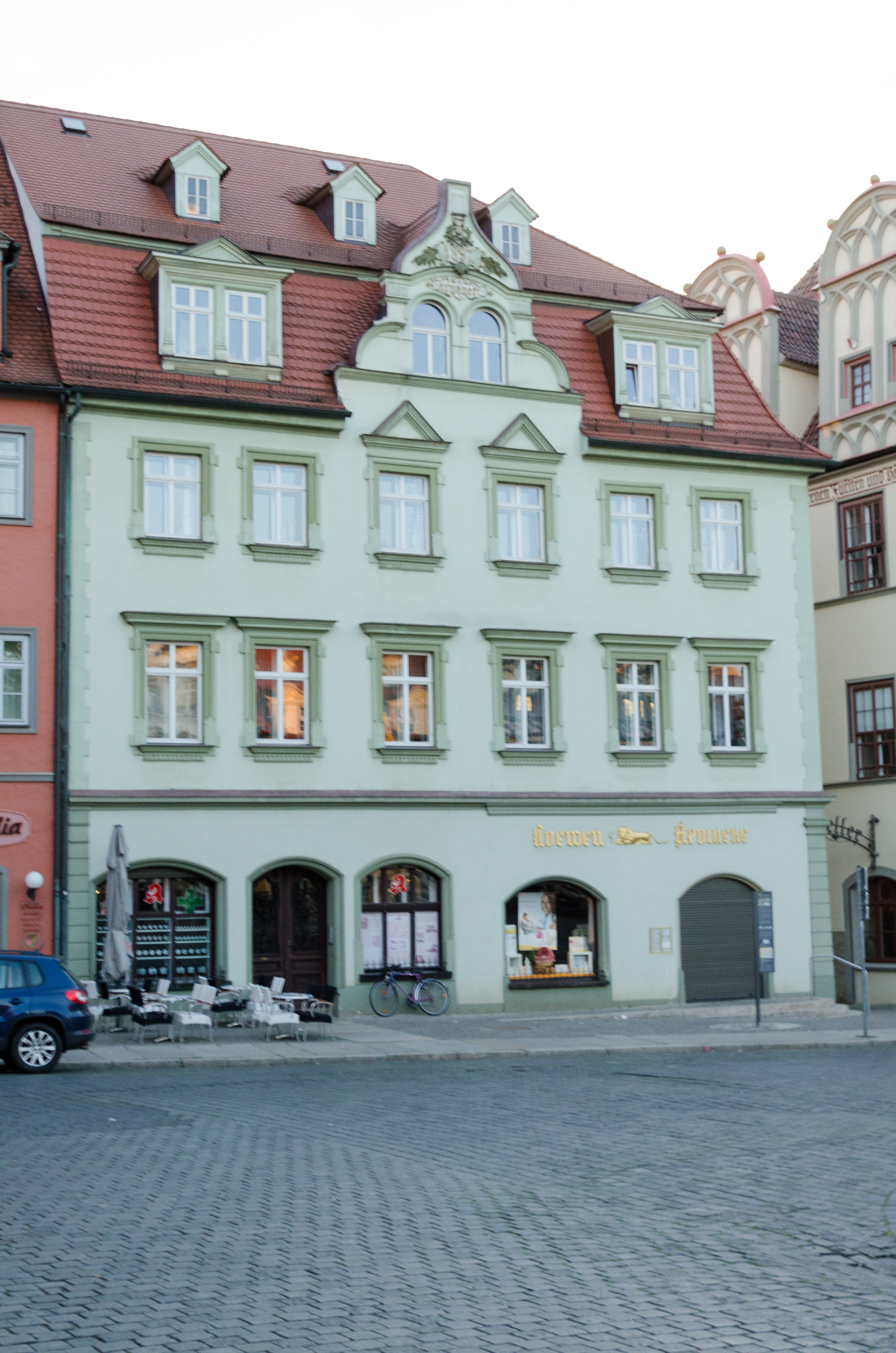 Naumburg, Markt 2